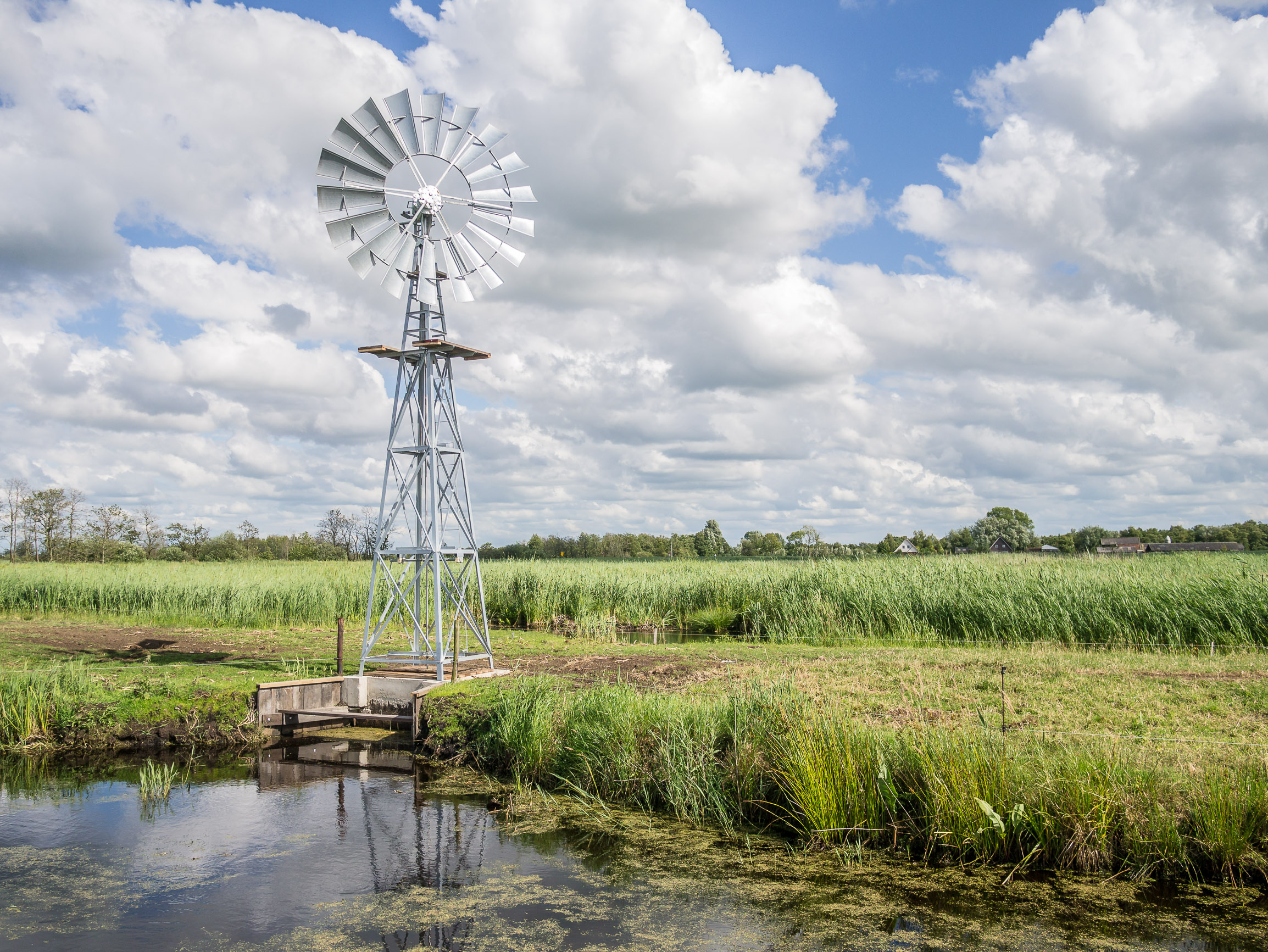 Nieuwe Aerikaanse windmotor in natinaal park de Alde Feanen This is a photo or sound file made in De Alde Feanen National Park in the Netherlands, with the main subject of the file in the category: humans in nature